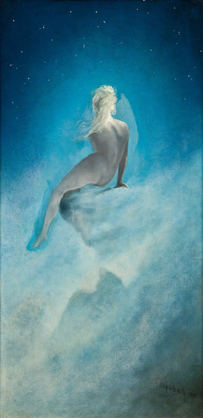 Frage an die Sterne. Öl auf Leinwand, 74 x 37 cm. Signiert und datiert: Diefenbach 1898